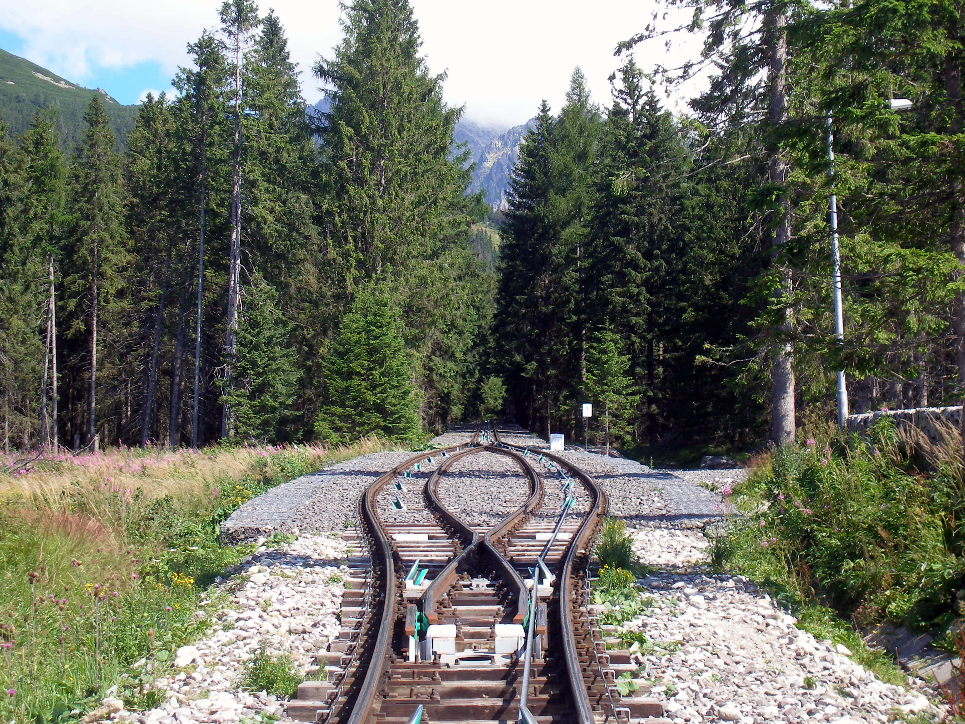 Osada Starý Smokovec, pohľad na koľajnice pozemnej lanovky v mieste stretávania sa vagónov